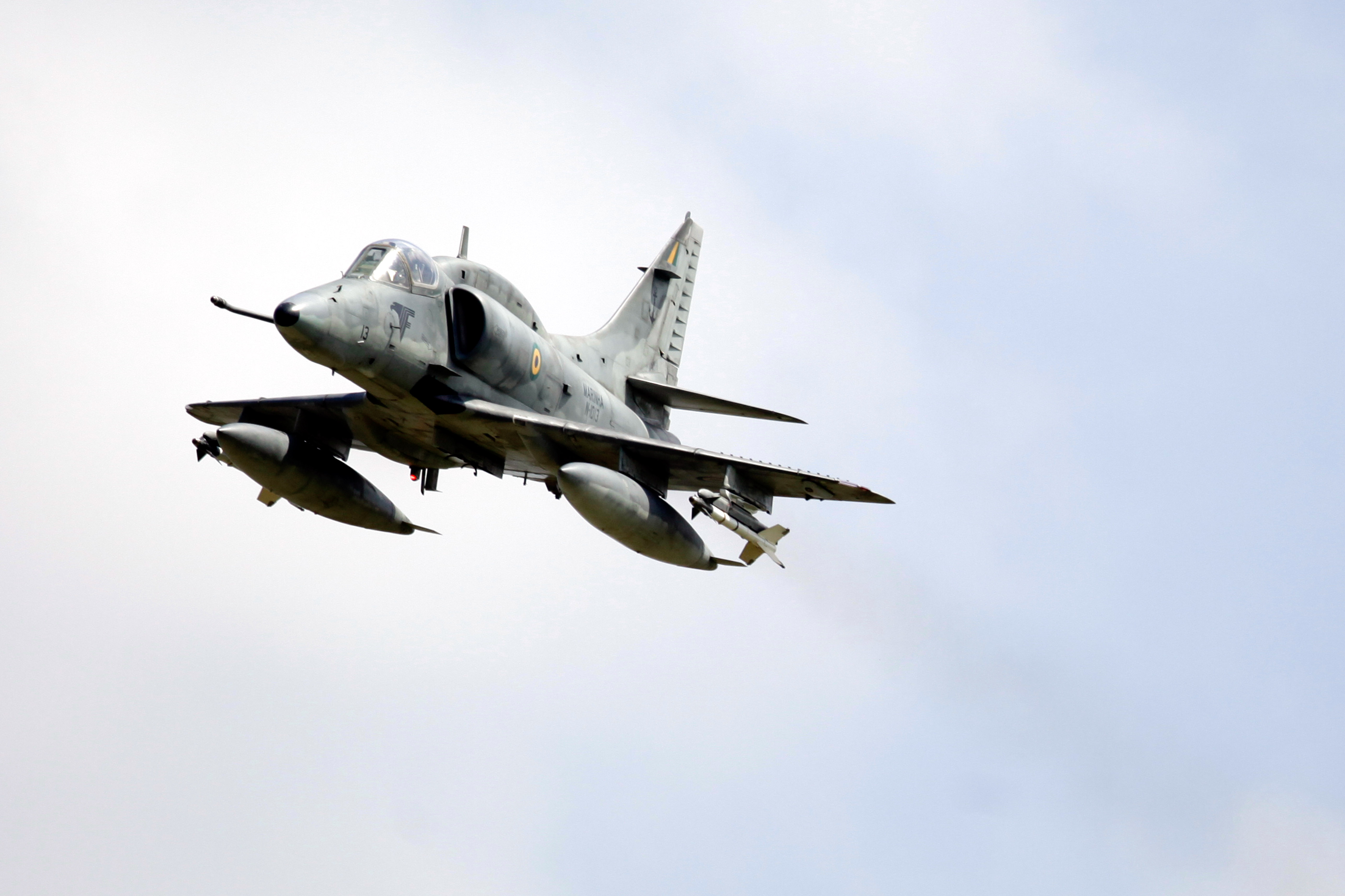 26/08/2013 - São Pedro da Aldeia, Rio de Janeiro. Fotos: Felipe Barra.